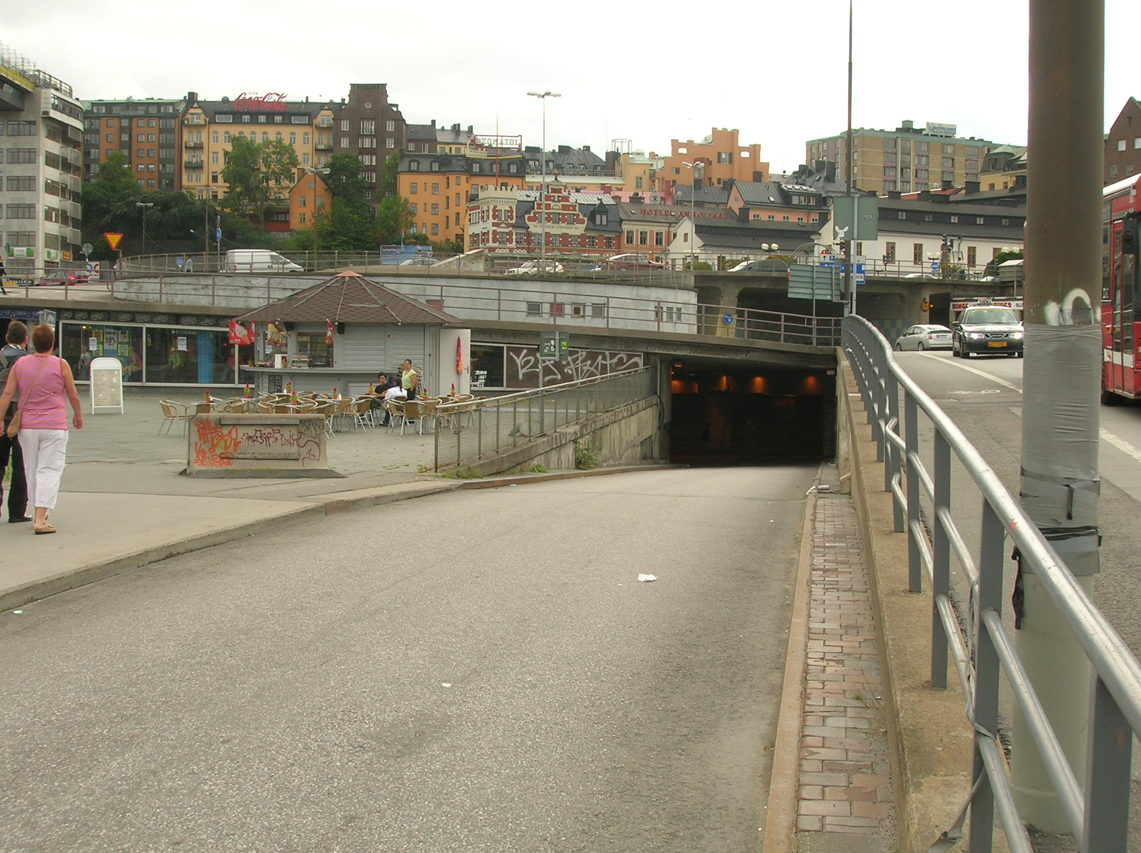 Västra terrassrampen at Slussen, Stockholm.